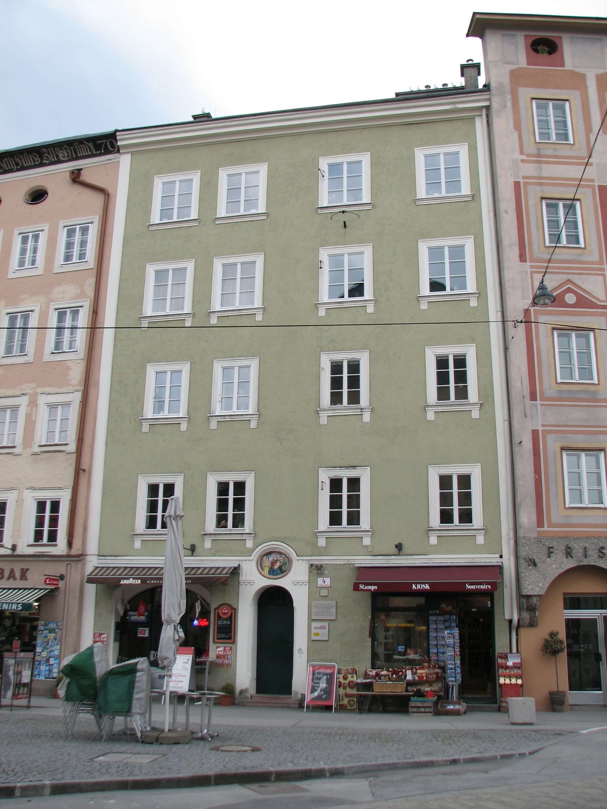 Bürgerhaus